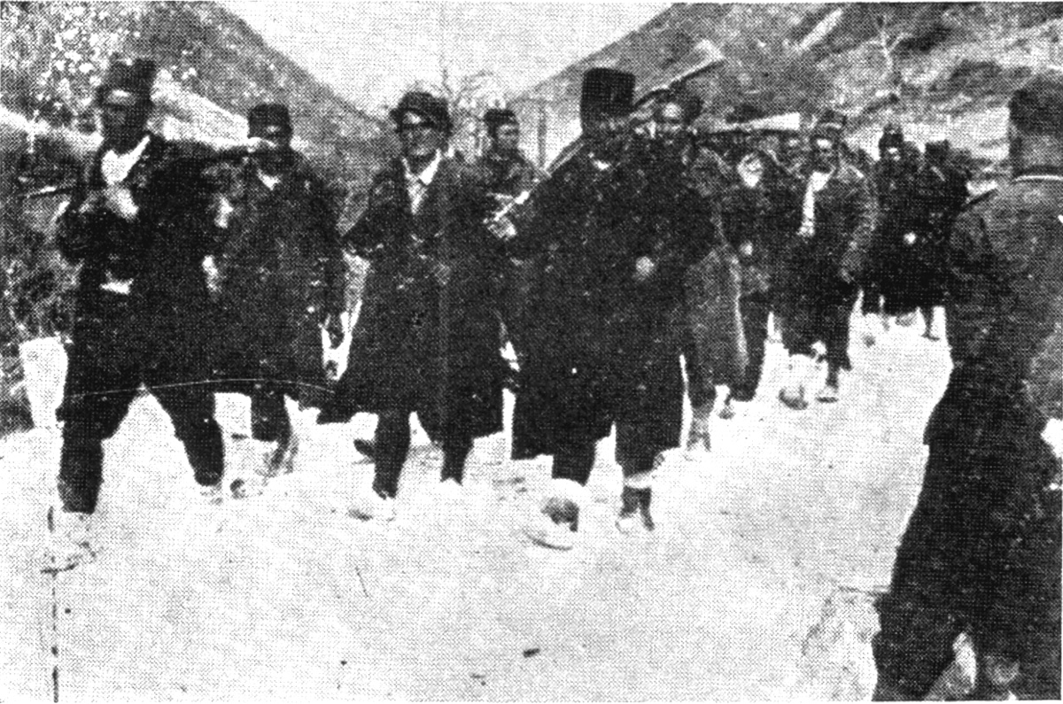 Srpskohrvatski / српскохрватски: Četnici sa Nemcima u dolini Neretve 1943.